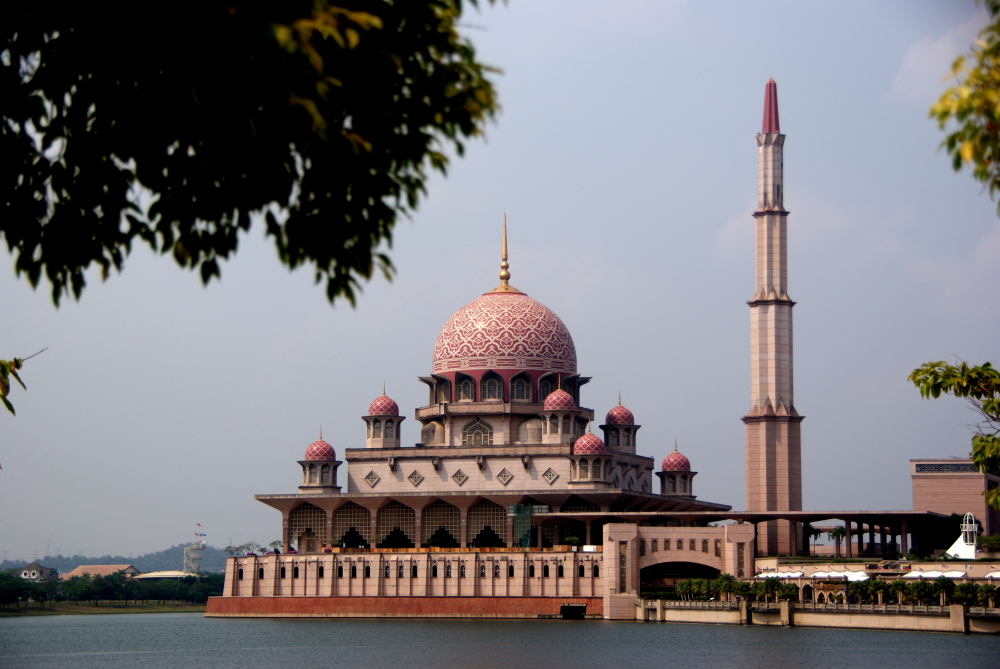 Putrajaya Mosque